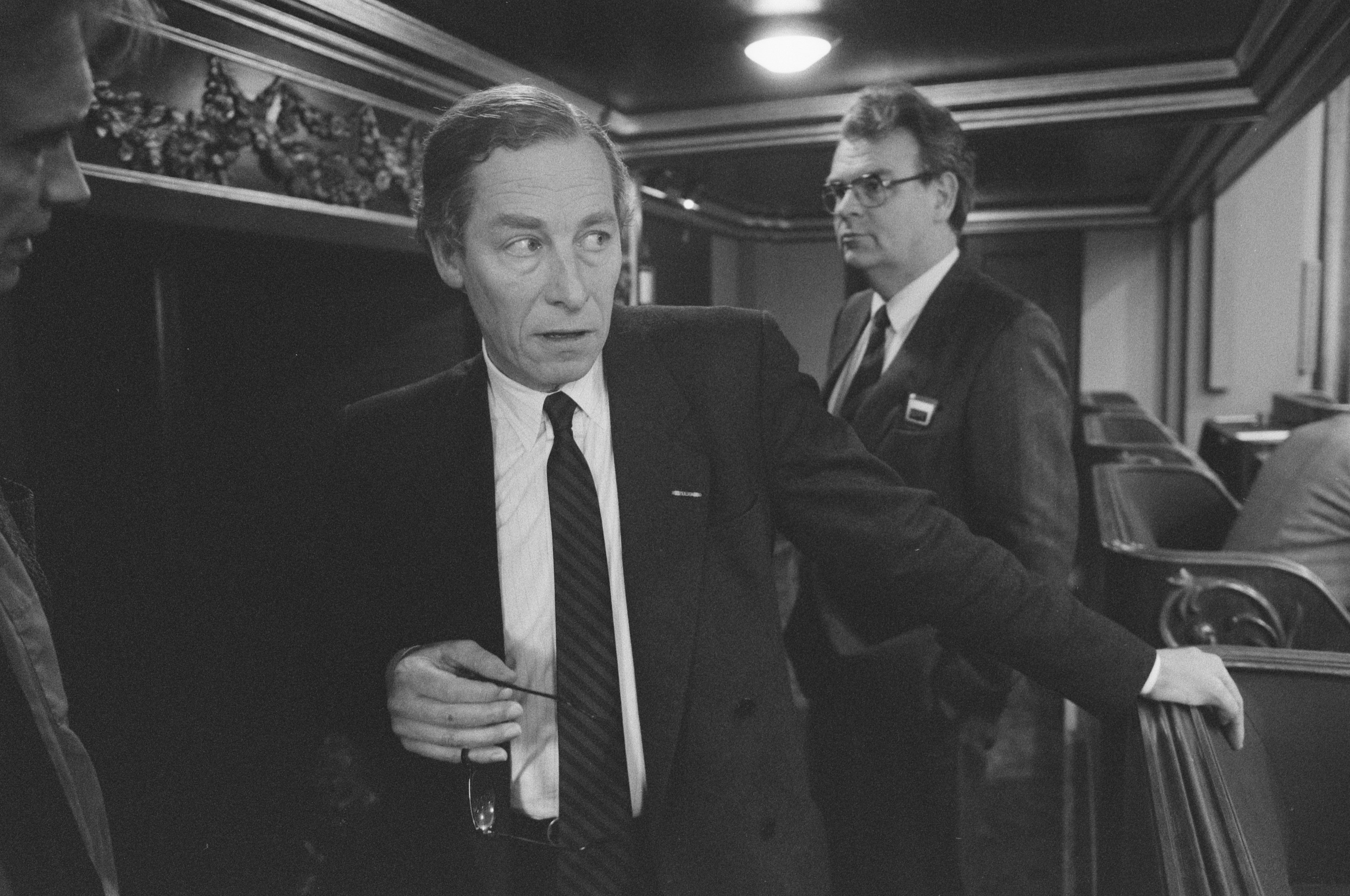 Collectie / Archief : Fotocollectie Anefo Reportage / Serie : De Eerste Kamer tijdens een microfoonstoring bij de behandeling van een wijziging in de Vreemdelingenwet Beschrijving : CDA-woordvoerder Glasz Datum : 10 januari 1989 Locatie : Den Haag, Zuid-Holland Trefwoorden : parlementaire debatten, parlementariërs, politiek, wetsontwerpen Persoonsnaam : Glasz, J.R. Fotograaf : Croes, Rob C. / Anefo Auteursrechthebbende : Nationaal Archief Materiaalsoort : Negatief (zwart/wit) Nummer archiefinventaris : bekijk toegang 2.24.01.05 Bestanddeelnummer : 934-3849